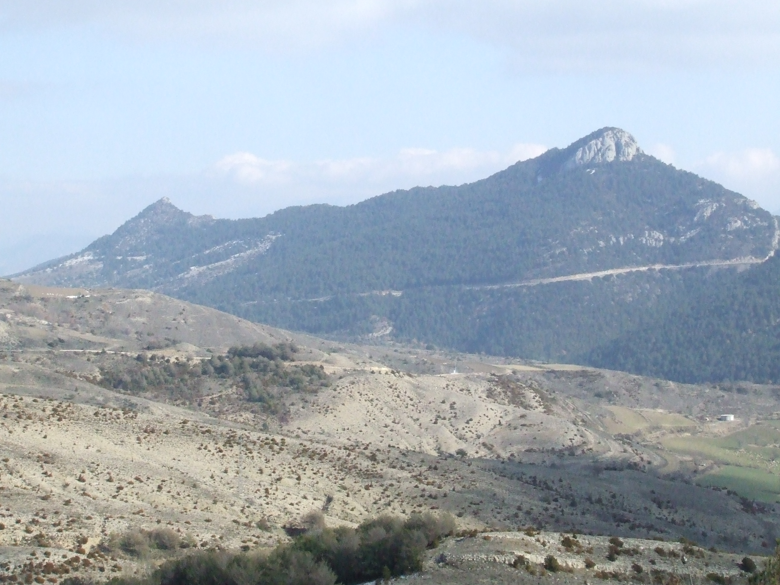 La serralada composta pel Tossal del Turnó, el Roc del Quer, la Roca Llisa i Setcomelles (Coll de Nargó, Alt Urgell, i Abella de la Conca, Pallars Jussà)